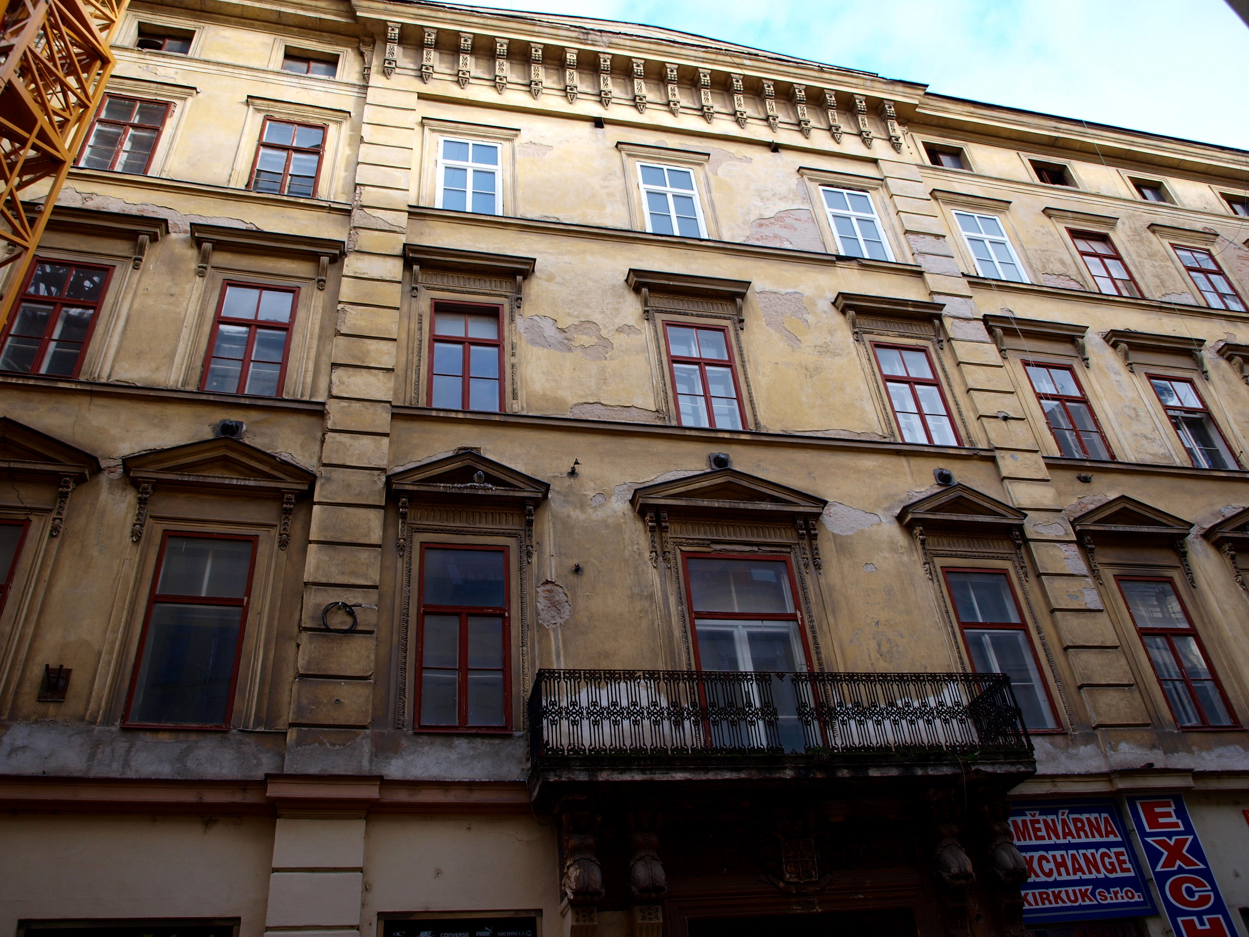 Palác Chlumeckých, Brno